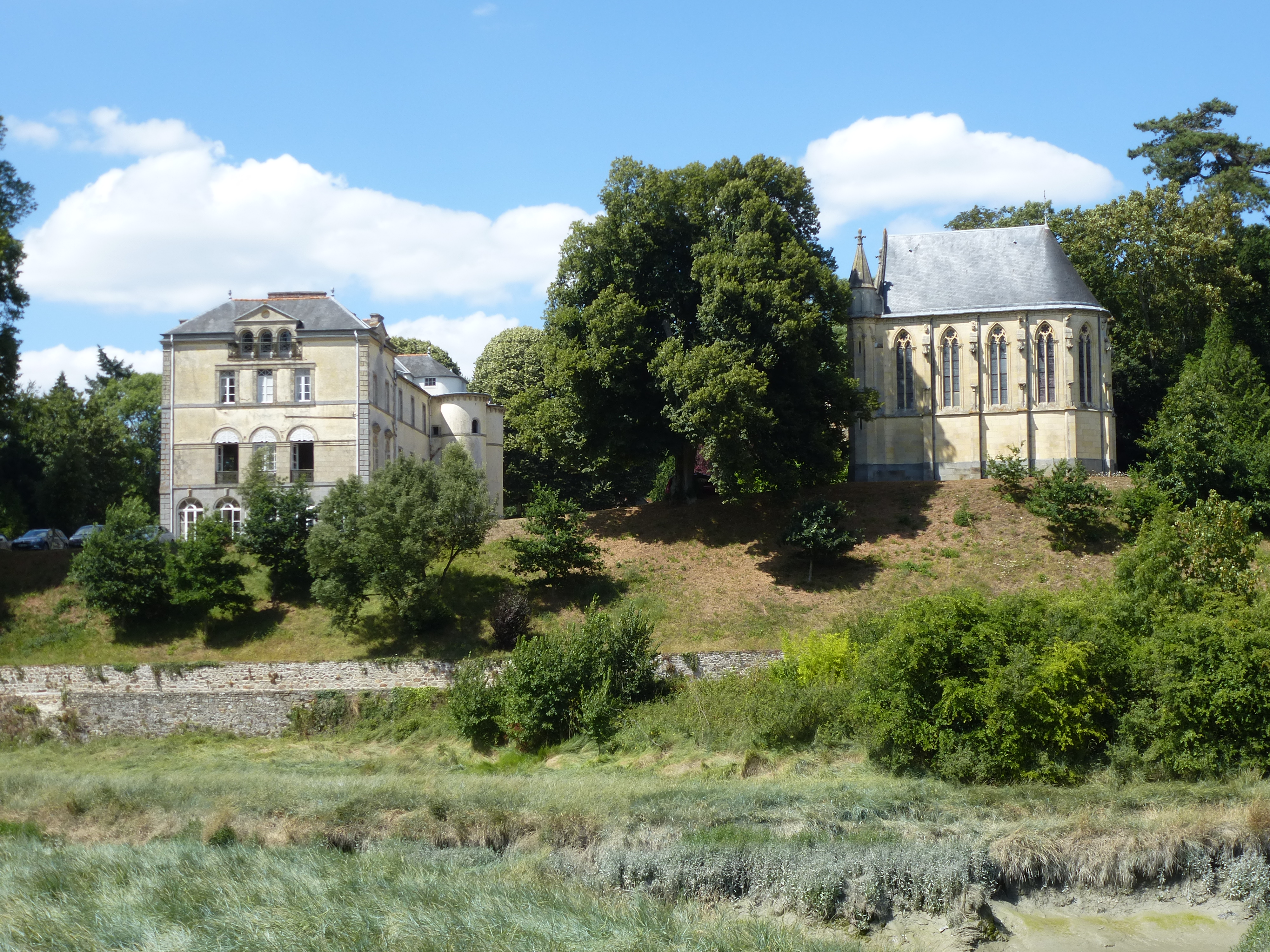 Château de Largentaye ou l'Argentaye et sa chapelle. ( commune de Saint-Lormel, département des Côtes-d'Armor, région Bretagne)